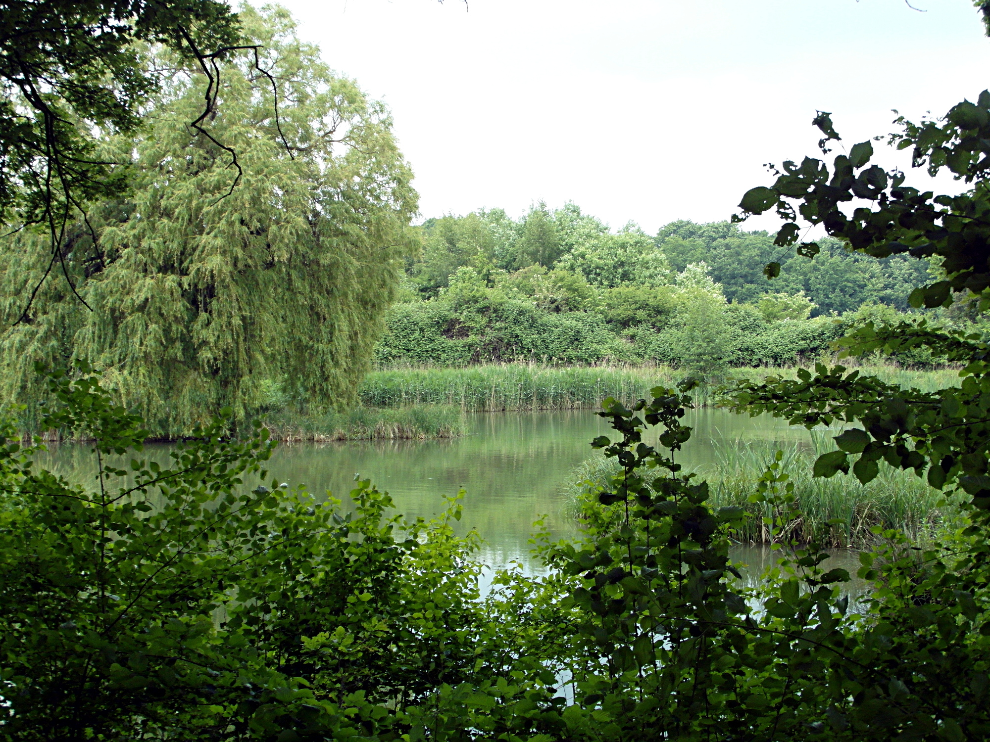 Blick durch eines des Sichtfenster in der Umzäunung des Biotops Badebornteich im Landschaftsschutzgebiet Benther-Berg-Vorland/Fössetal am Südwestrand des Stadtgebiets von Hannover.